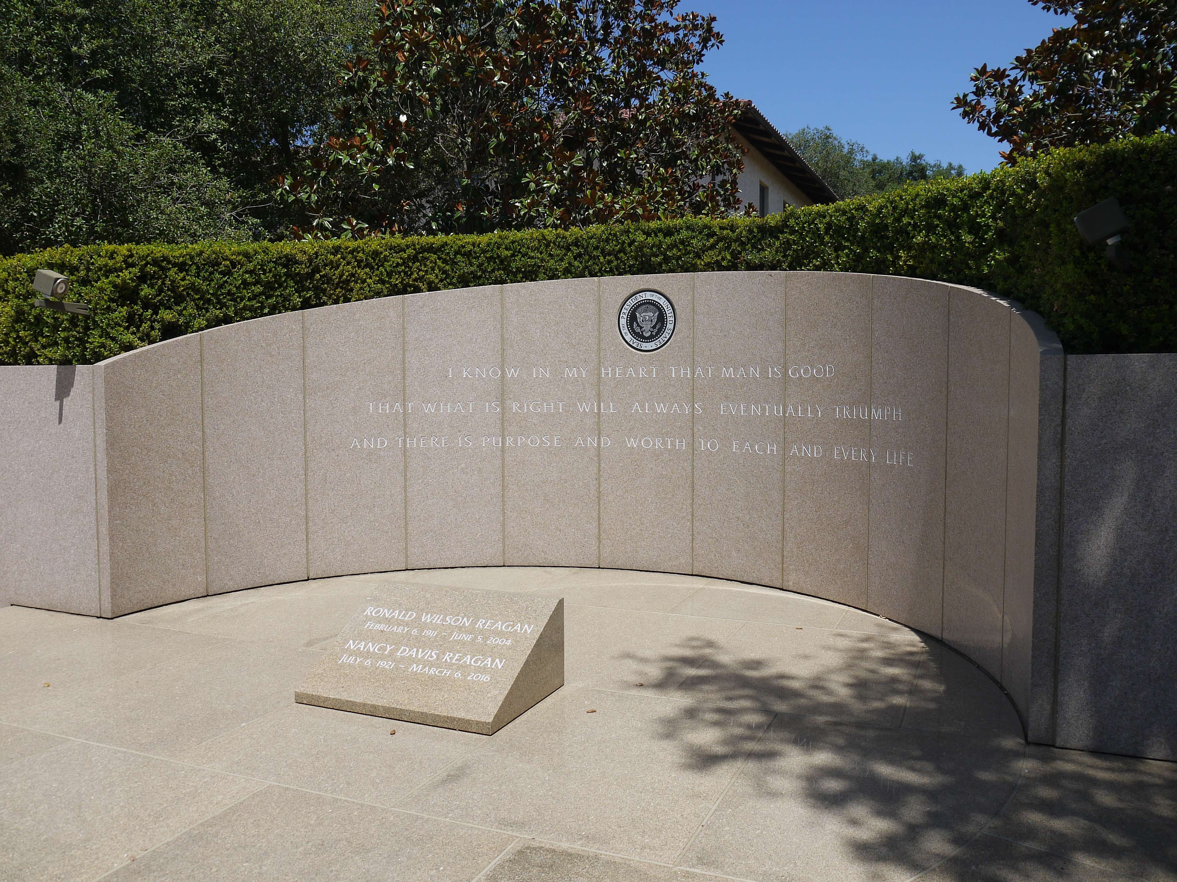 Grabmal von Ronald und Nancy Reagan auf dem Gelände der Ronald Reagan Presidential Library